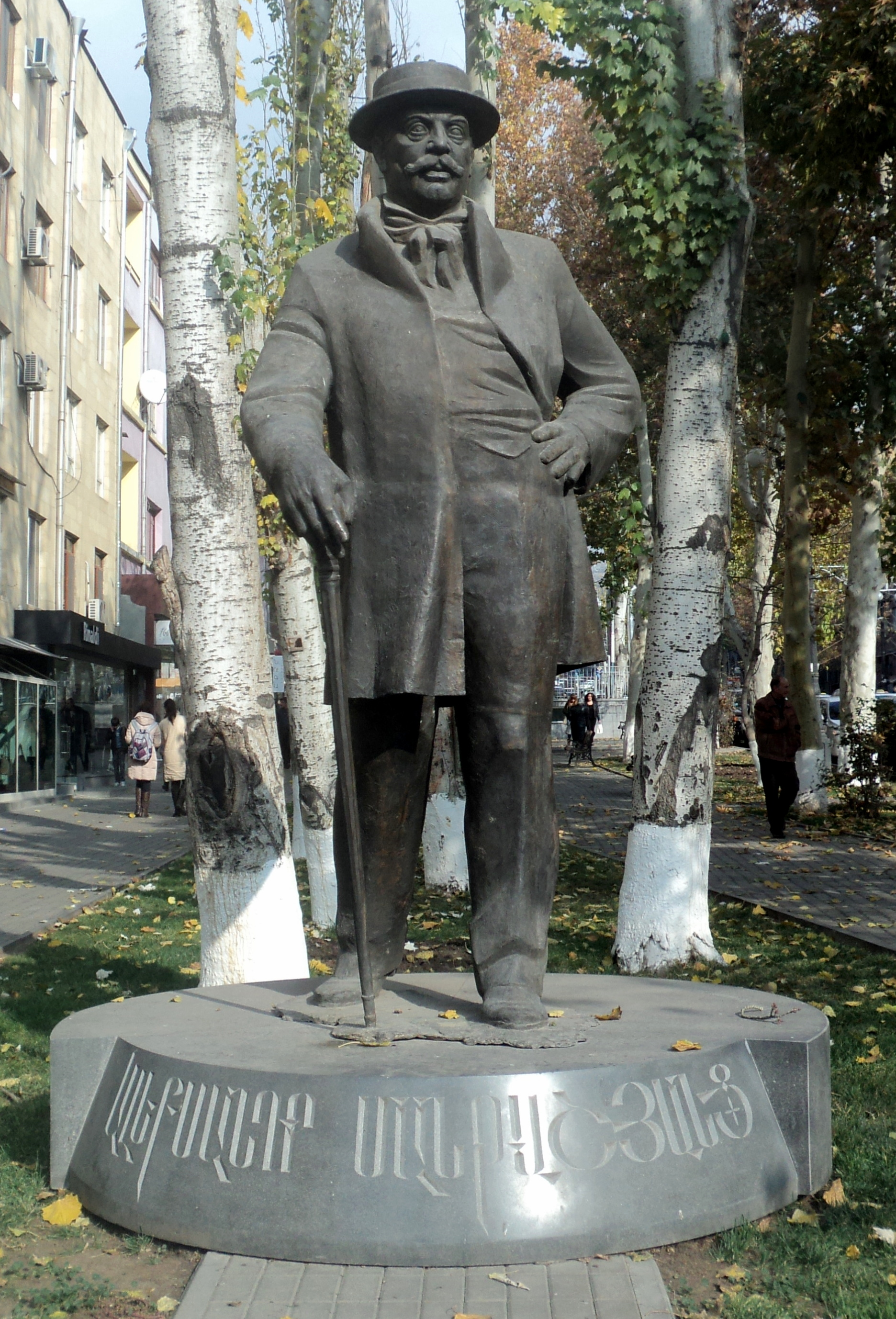 Քանդակագործ Տիգրան Արզումանյան